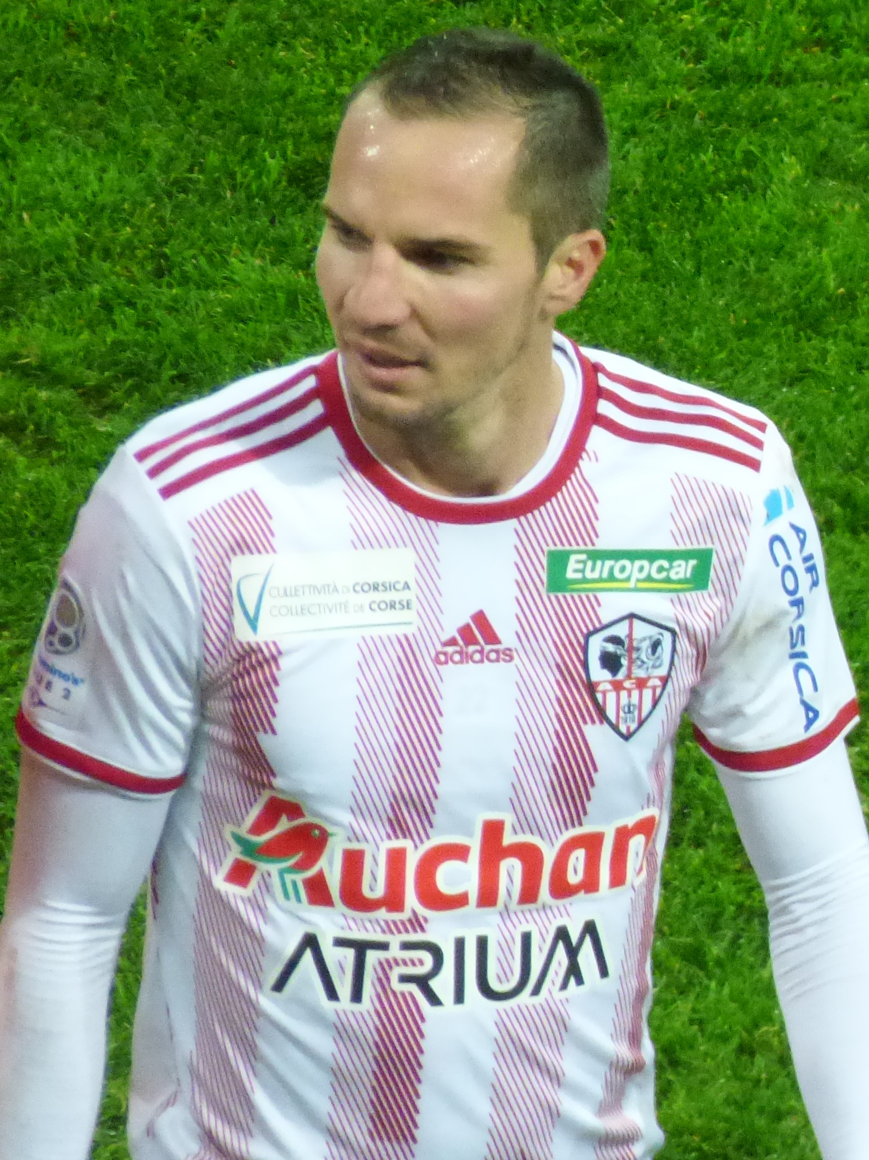 Kevin Lejeune pendant le match RC Lens - AC Ajaccio, comptant pour la dix-neuvième journée du championnat de France de Ligue 2 2018-2019, le 22 décembre 2018, au Stade Bollaert-Delelis de Lens.